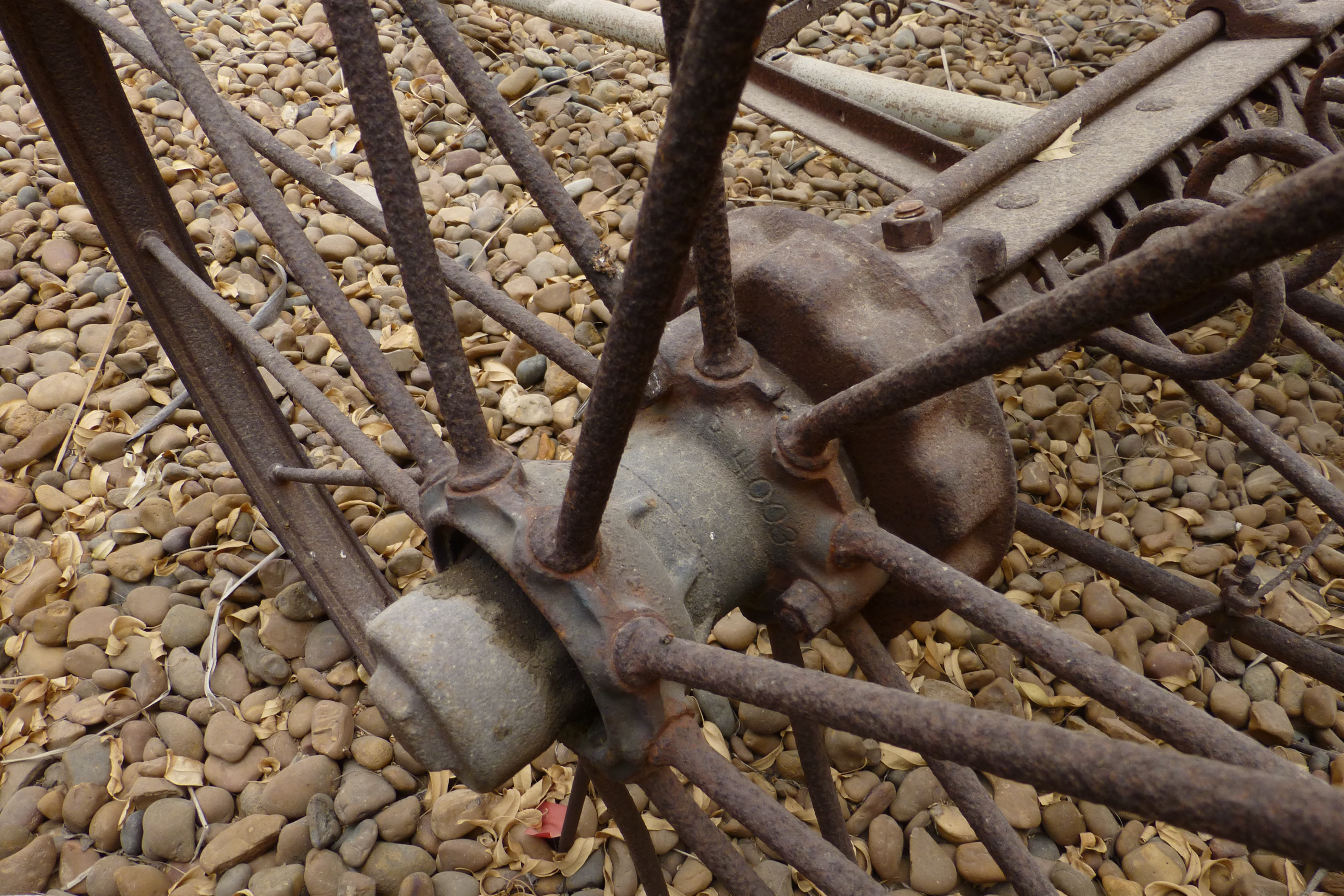 נבנה ב1924, על ידי משה ורחל מינץ. שימש בחלקו המערבי כבית מגורים ובחלקו המזרחי כבית עם. כיום הוא משכנו של מוזיאון לתולדות גדרה והביל"ויים.